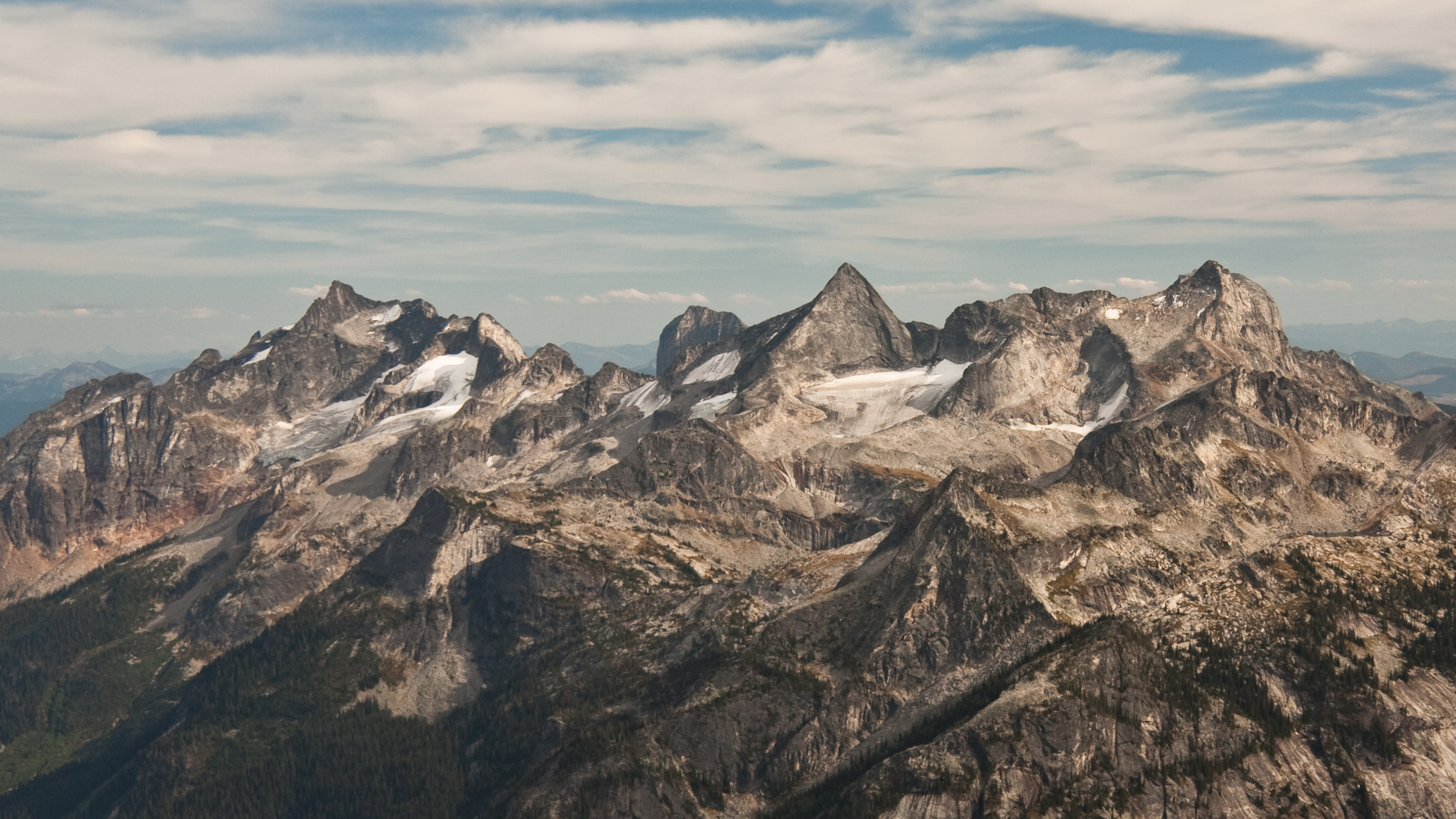 Valhallas